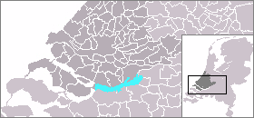 Kaart van het Hollands Diep, gemaakt uit sjabloon van Wikipedia-gebruiker Mtcv